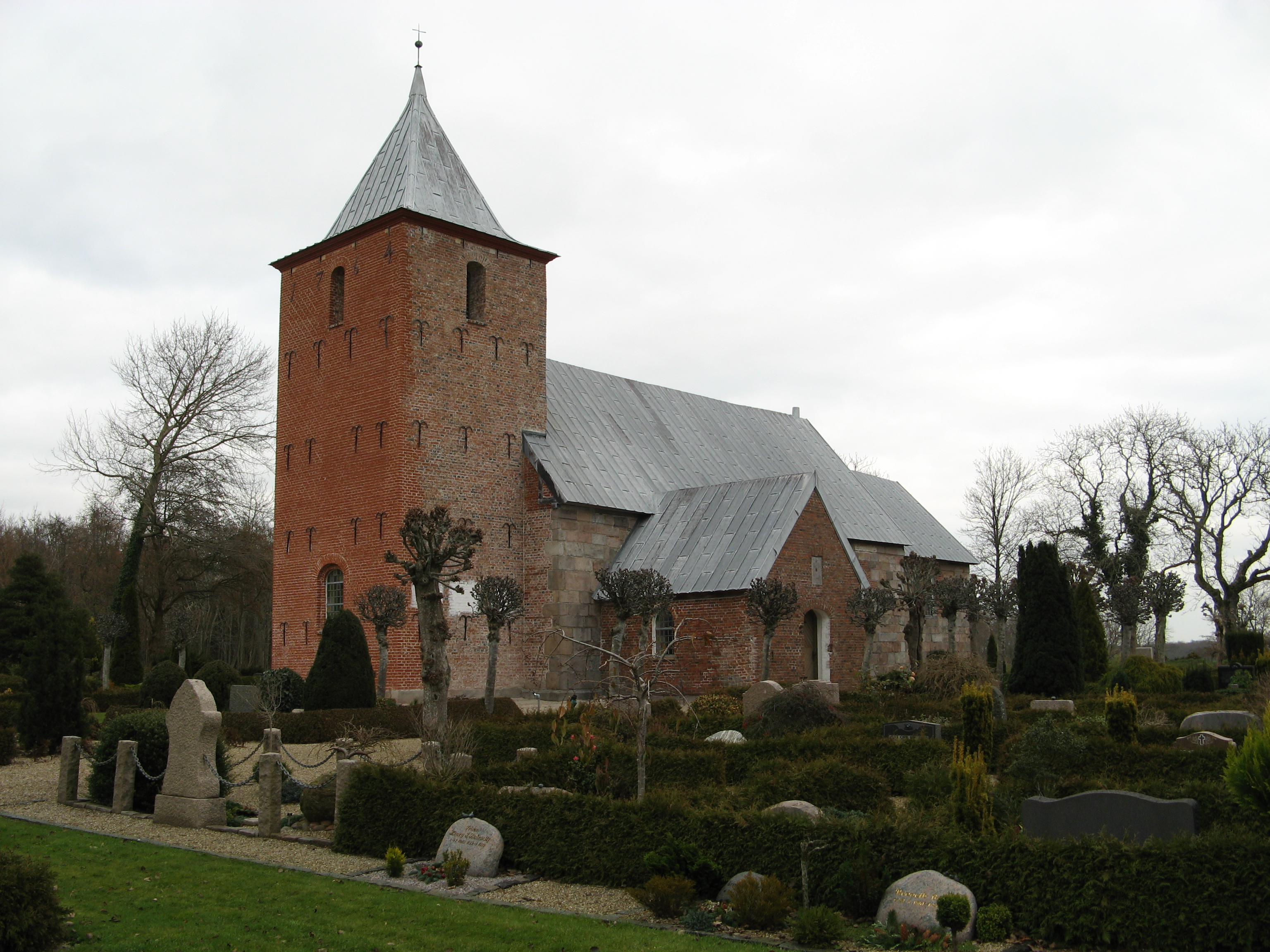 Vester Nykirke, Vester Nykirke sogn, Esbjerg kommune (former: Skads Herred, Ribe Amt). Kirken set fra sydvest